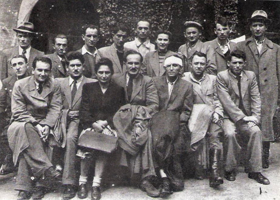 מנהיגי ארגון הבריחה בפולין 1946 - יושבים: טוביה כהן (שלישי מימין), איסר בן צבי (רביעי מימין), לובה גלר (חמישית מימין), צבי נצר (שישי מימין)